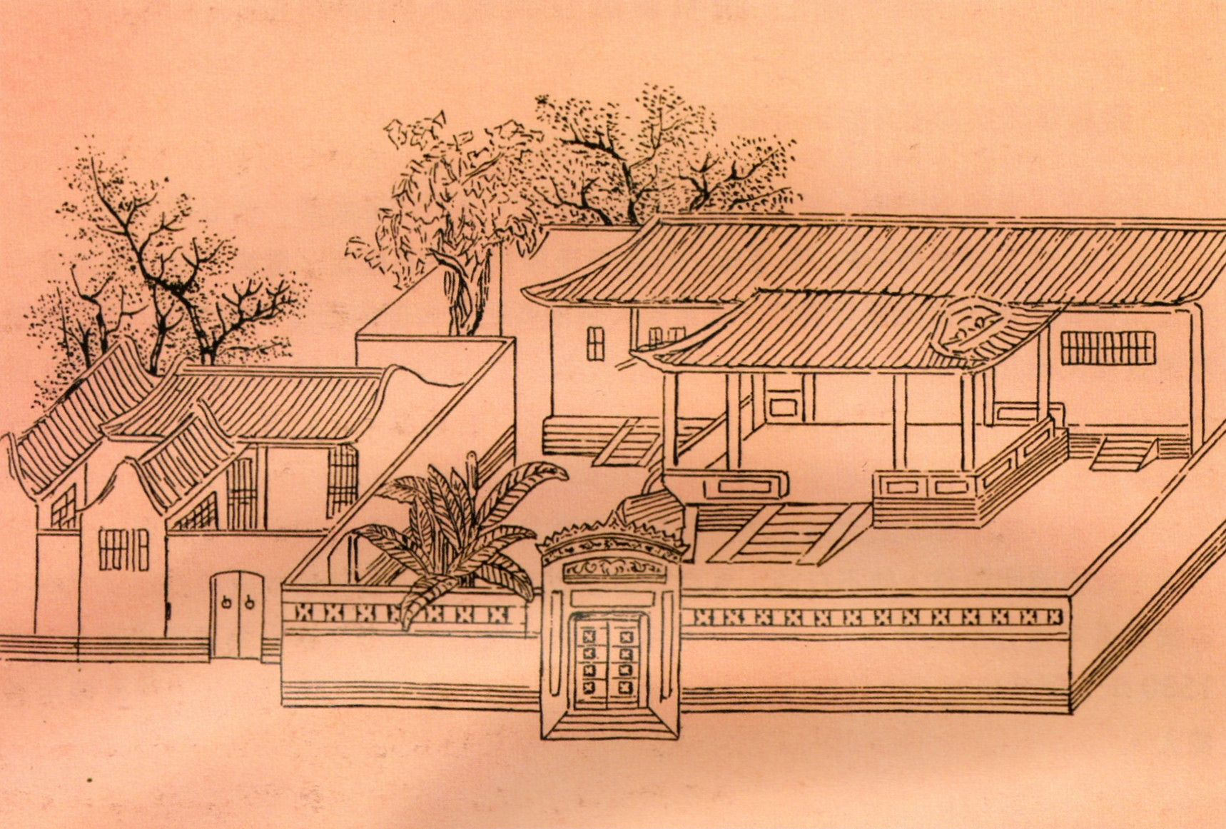 《澳門紀略》中的議事亭